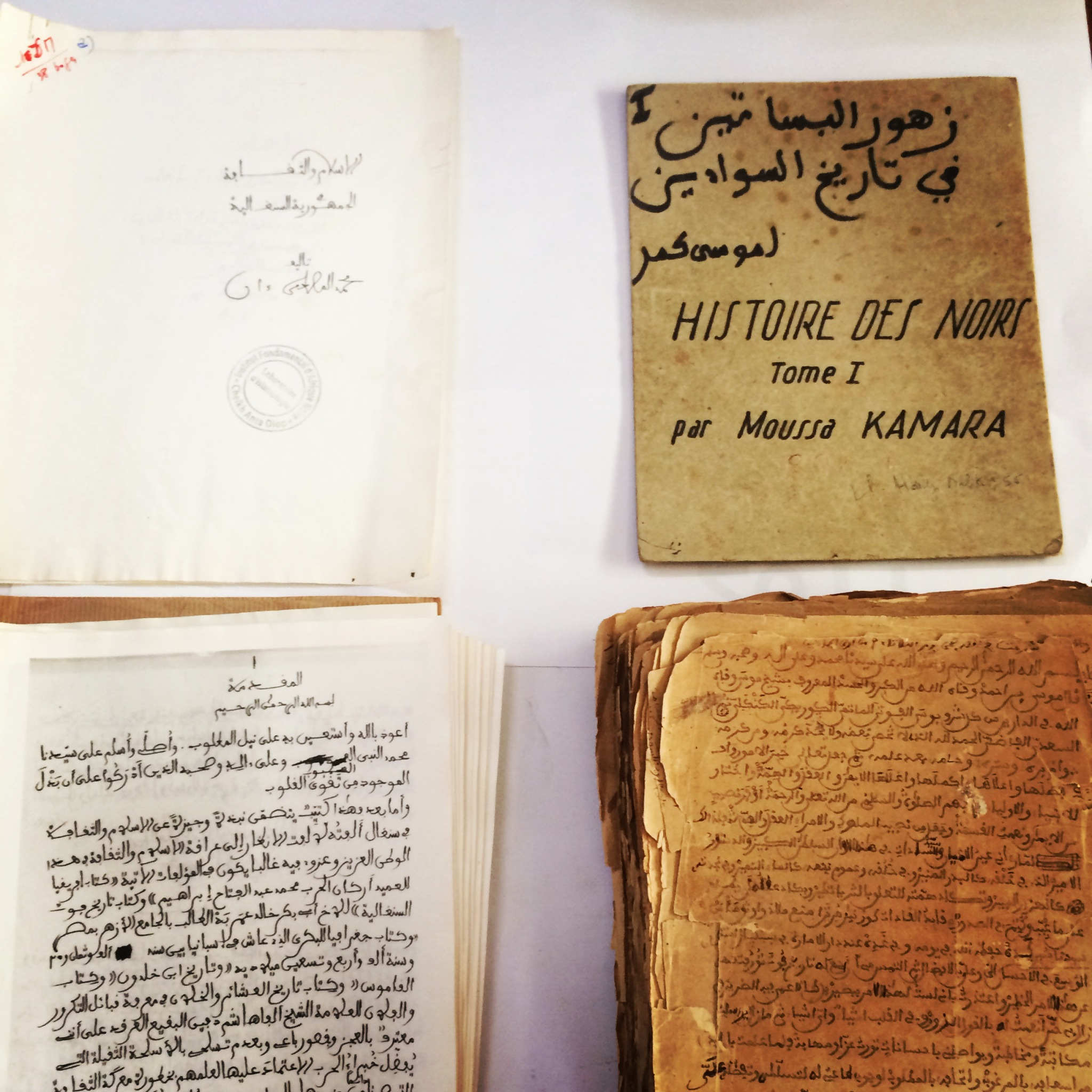 Islamology at IFAN, Dakar, Senegal.